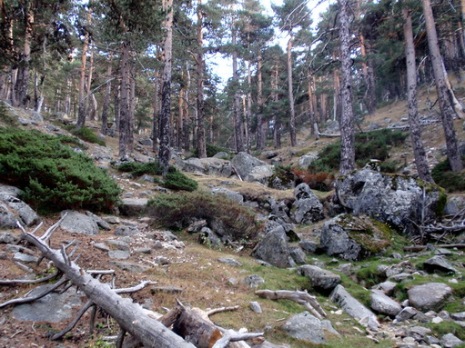 Camino Schmidt- Cruce con Arroyo del Telégrafo.